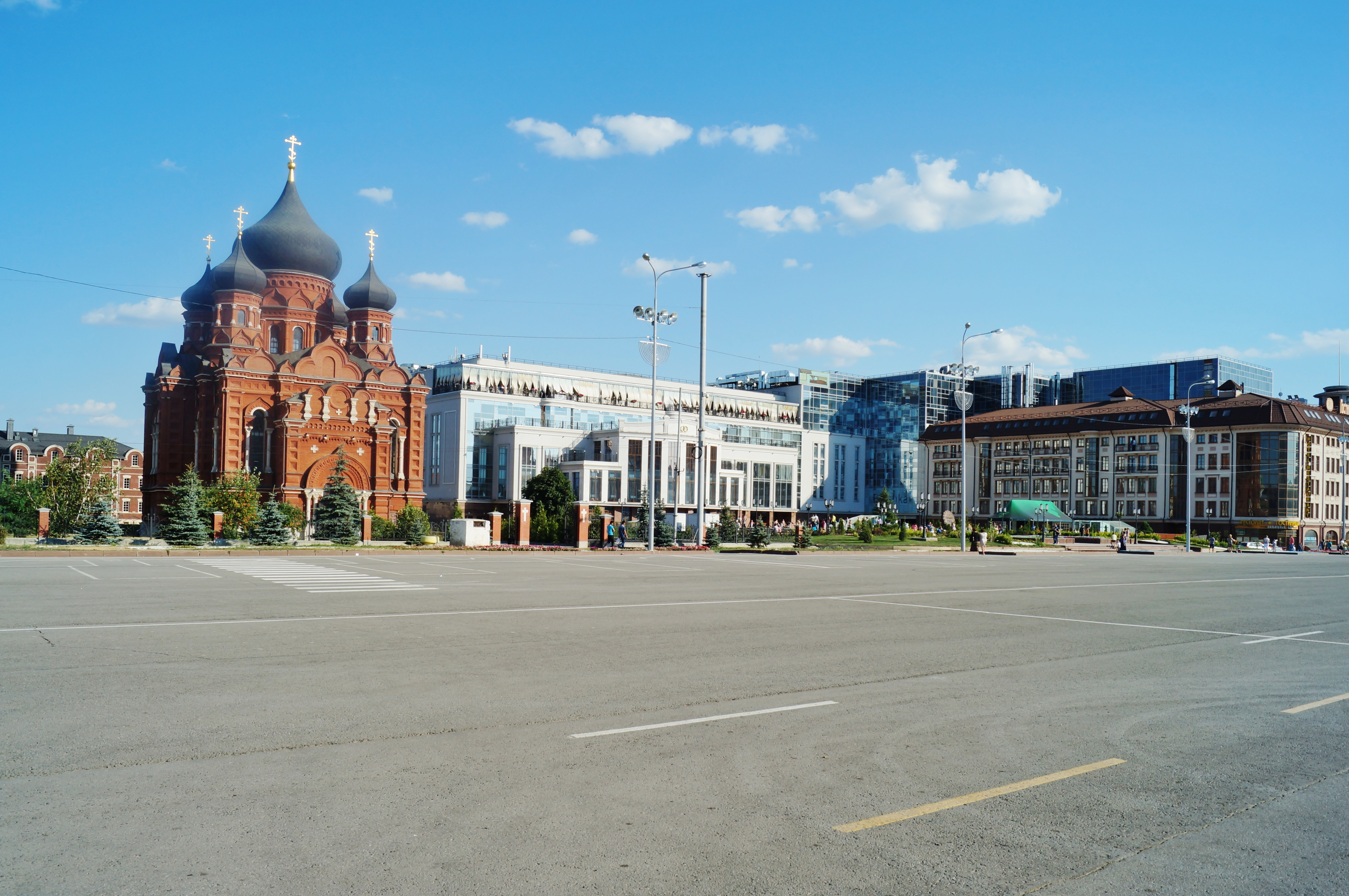 Cathedral of the Dormition at Uspensky Convent (Tula, Russia)